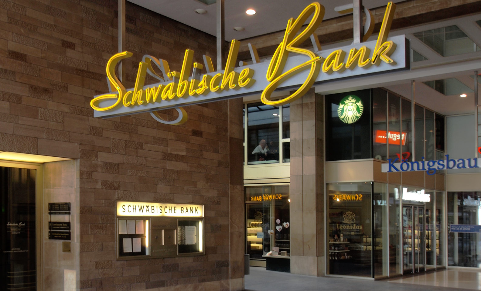 Schwäbische Bank im Königsbau am Stuttgarter Schlossplatz. Dahinter ein Chocolatier Leonidas und der Eingang zu den Königsbau-Passagen.